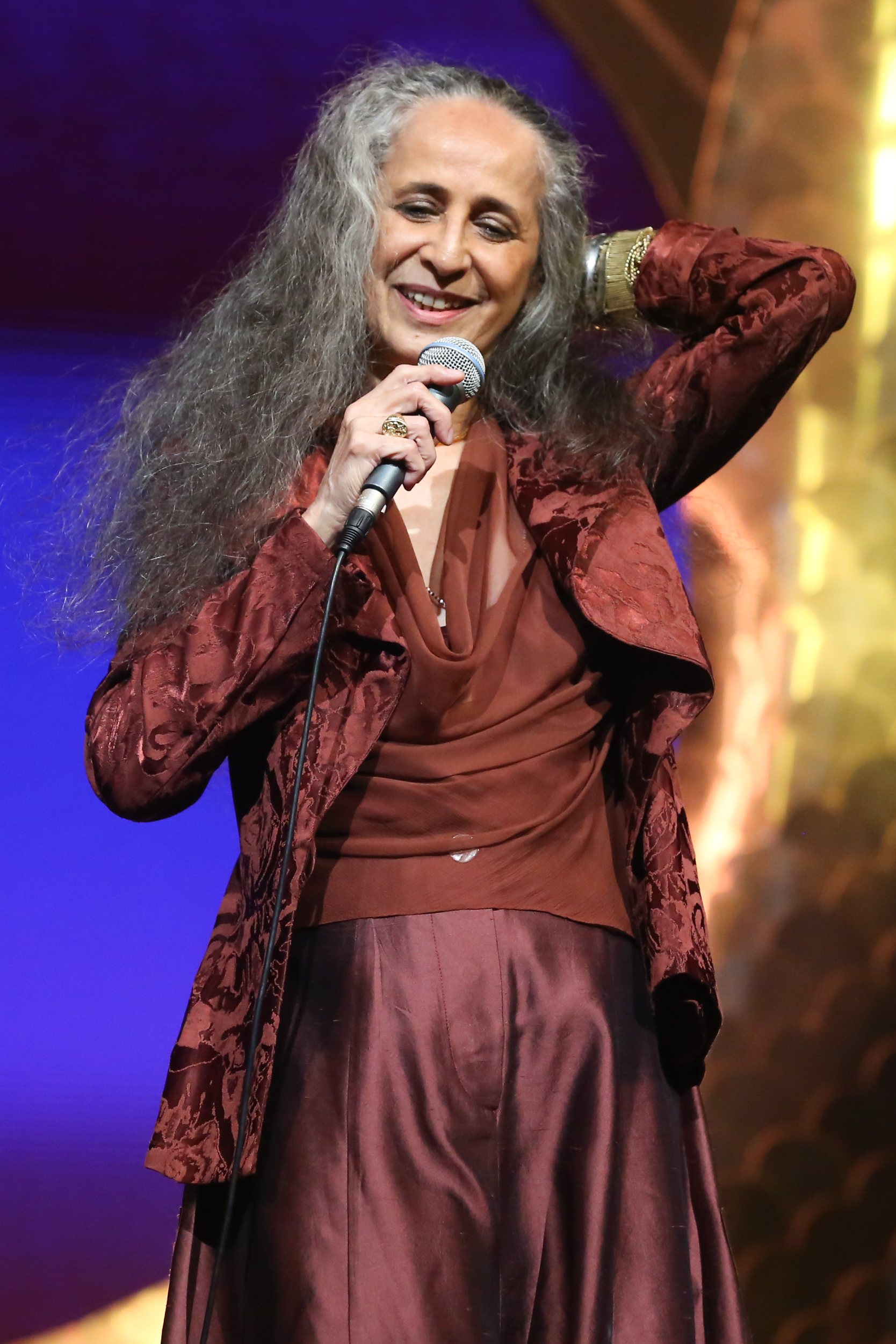 Maria Bethânia - 26° Prêmio da Música Brasileira 2015, no Theatro Municipal, no Centro do Rio de Janeiro/RJ. (10/06/15) Foto: Roberto Filho/Divulgacão